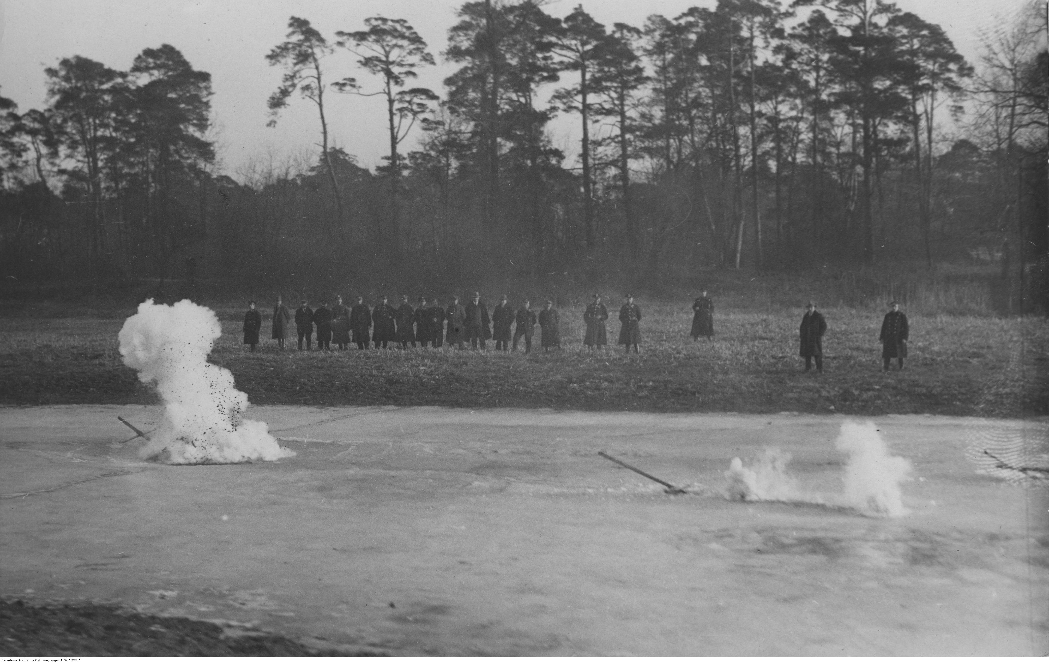 Pokazy rozsadzania lodu w 7 Batalionie Saperów w Poznaniu; marzec 1930. Koncern Ilustrowany Kurier Codzienny - Archiwum Ilustracji. Sygnatura: 1-W-1723-1